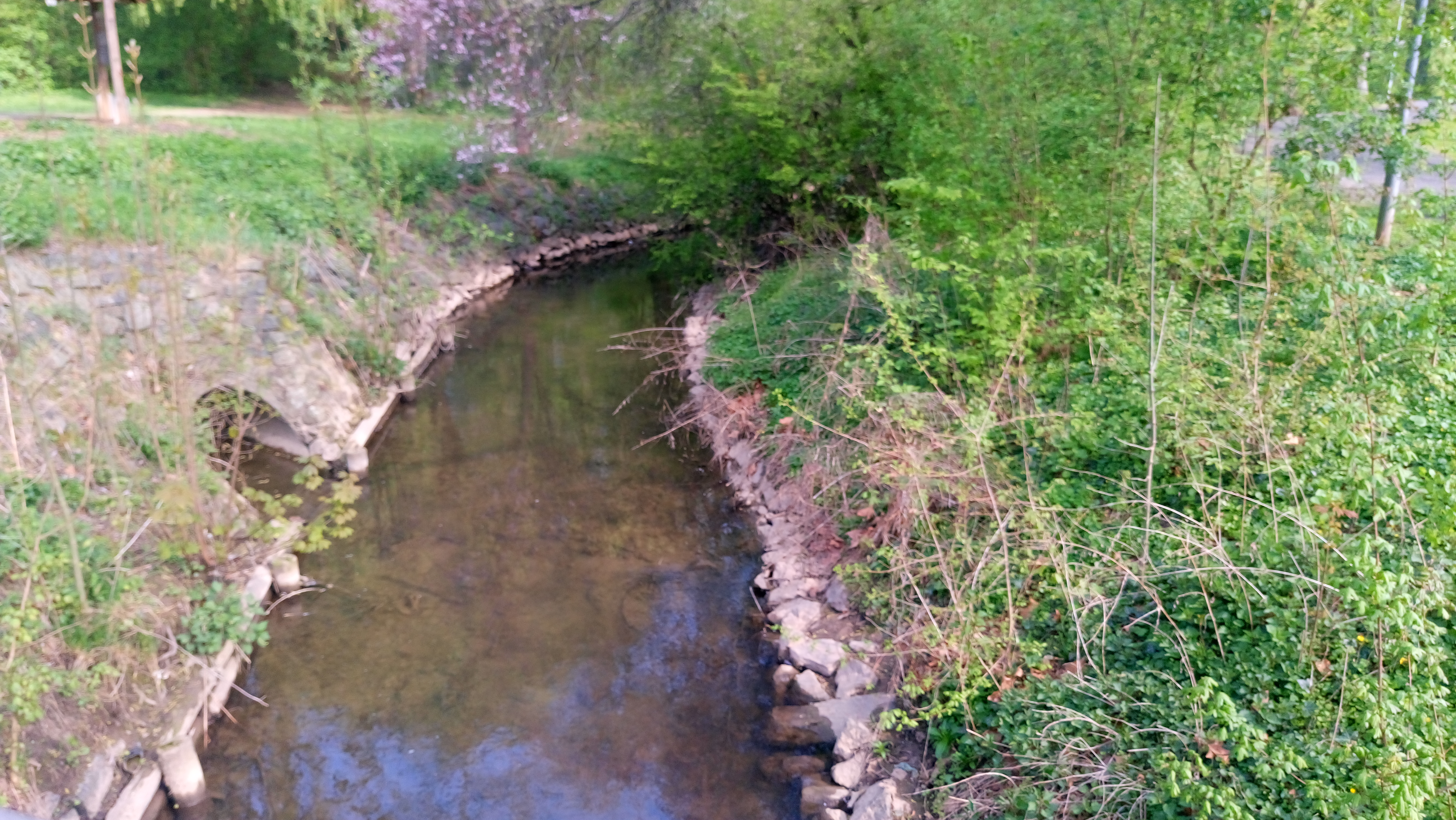 Der Krebsbach in Bruchköbel